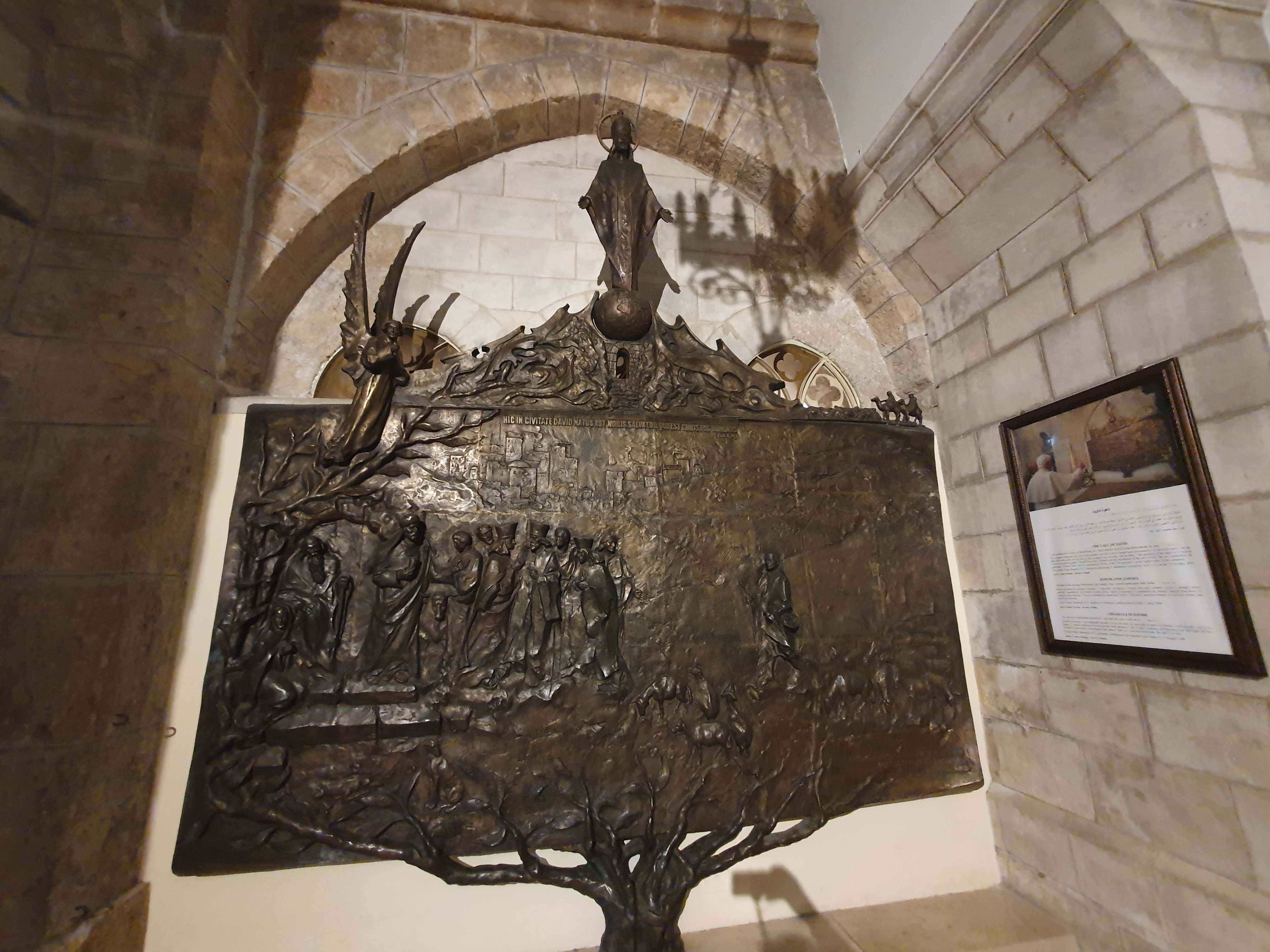 Mural en el Templo de Santa Catarina, Belén, Palestina